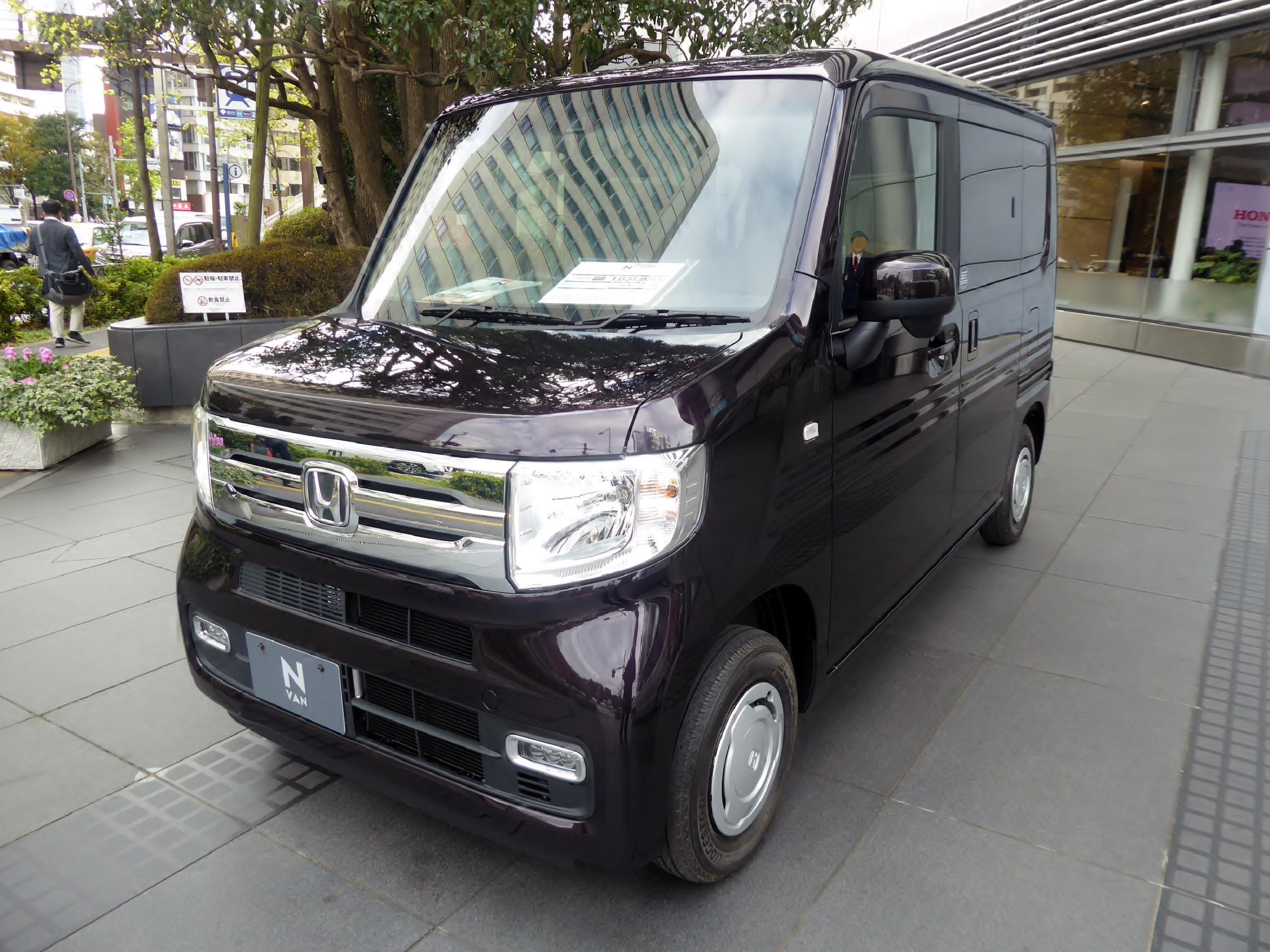 HBD-JJ1型ホンダ・N-VAN +STYLE COOL Honda SENSINGをフロントから撮影。